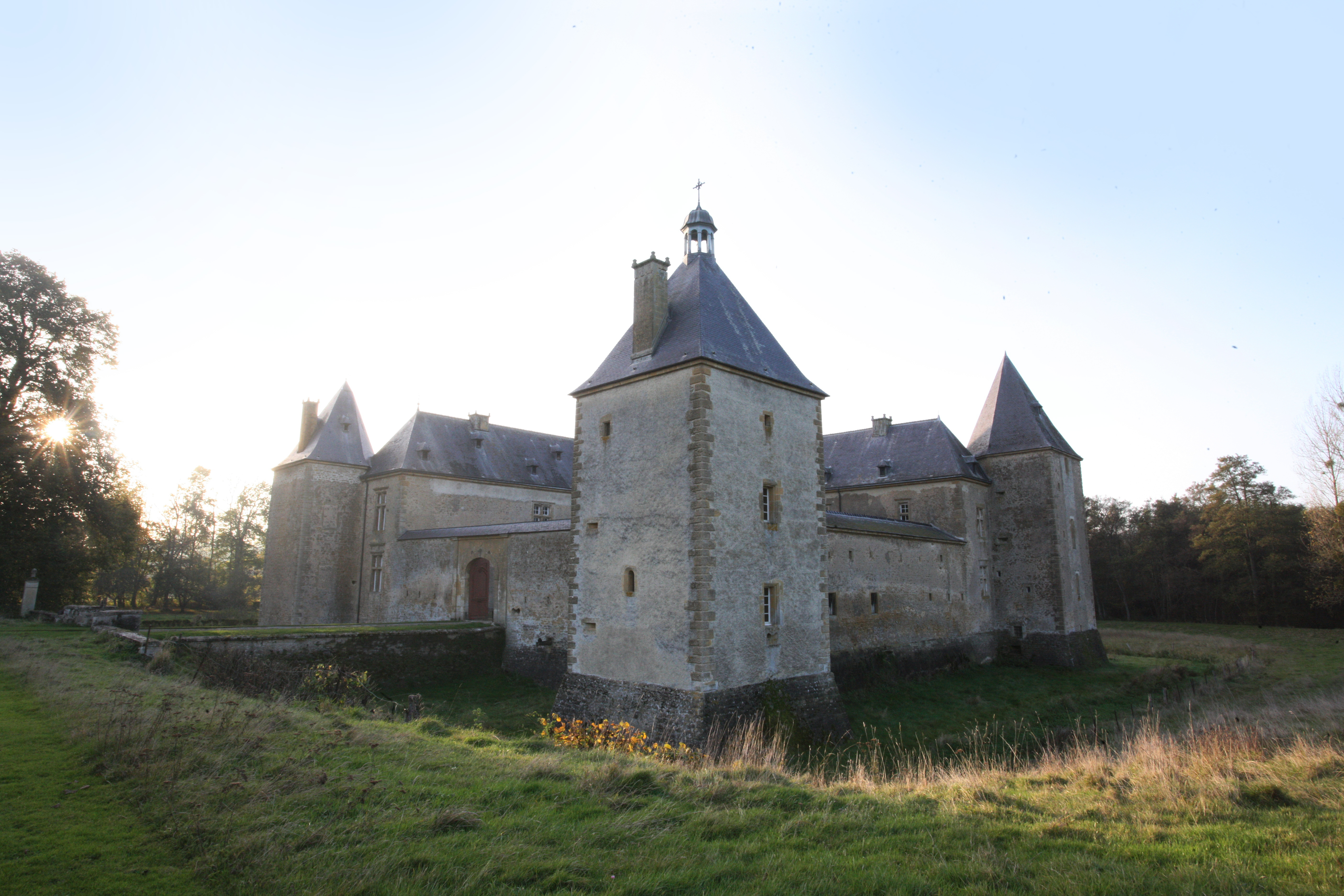 Village Ardennais